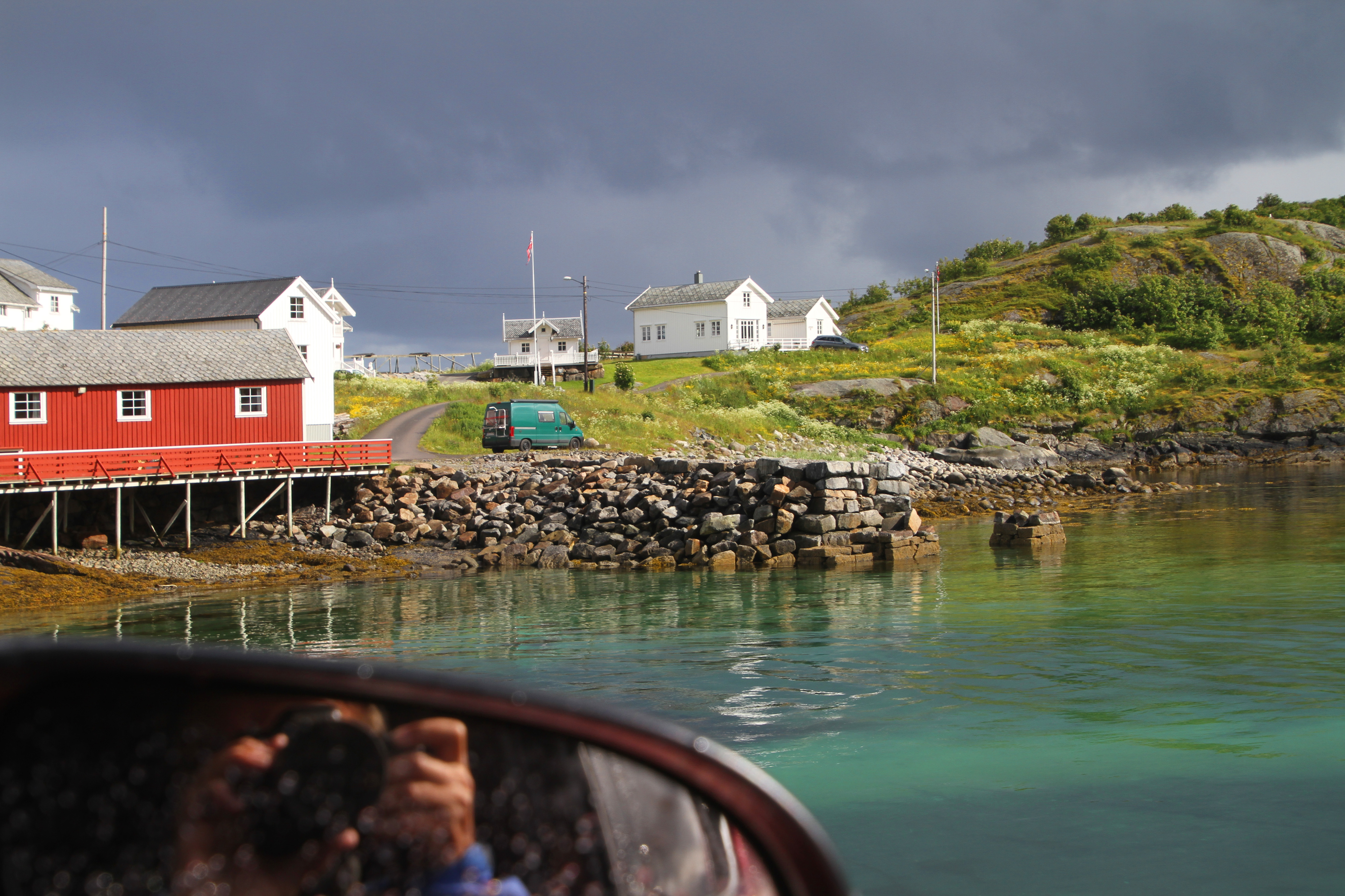 Lofoten-Insel Sakrisøy in Norwegen